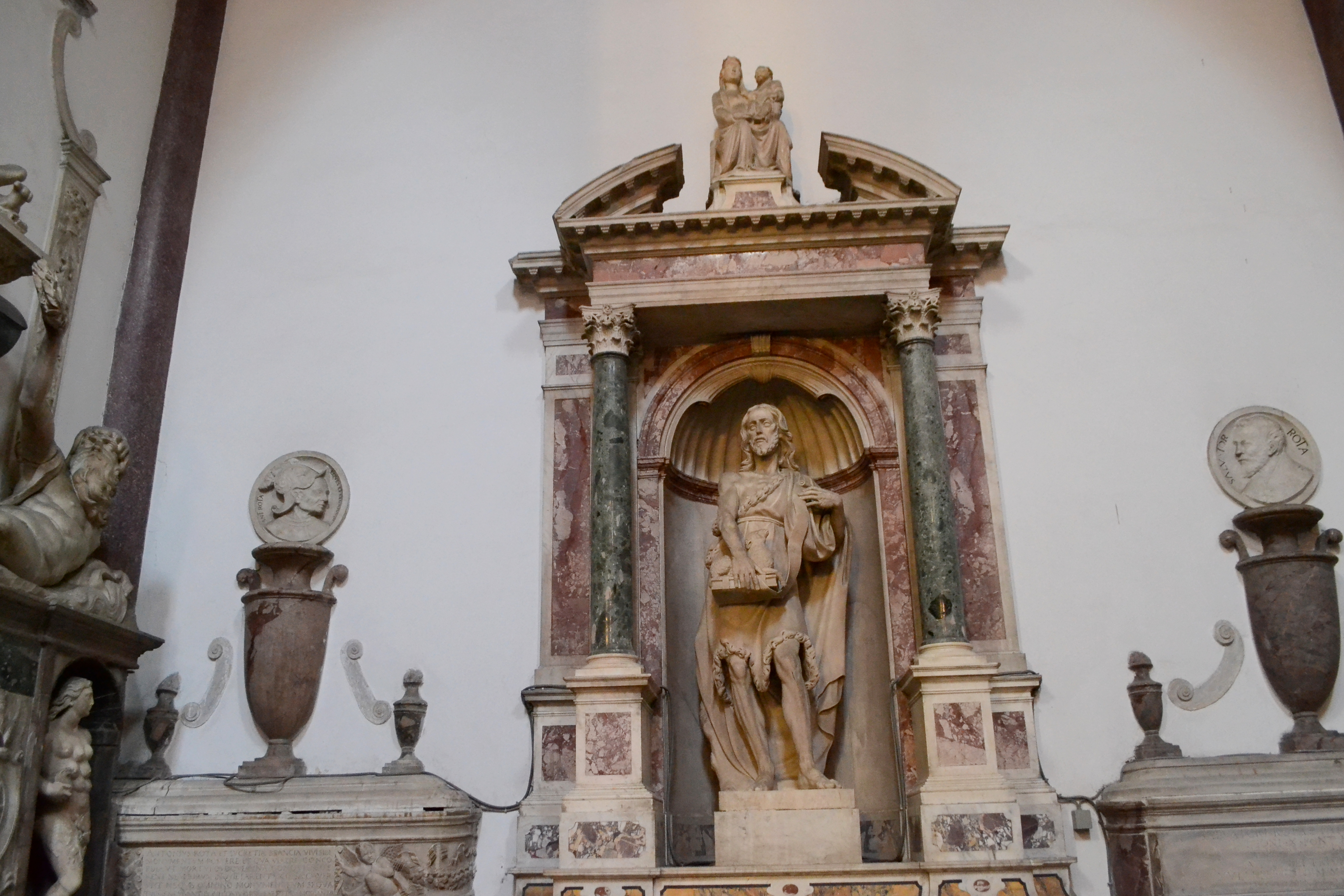 Cappella di San Giovanni Battista della chiesa di San Domenico Maggiore di Napoli. Al centro è l'altare marmoreo di Girolamo D'Auria con la statua di San Giovanni Battista.